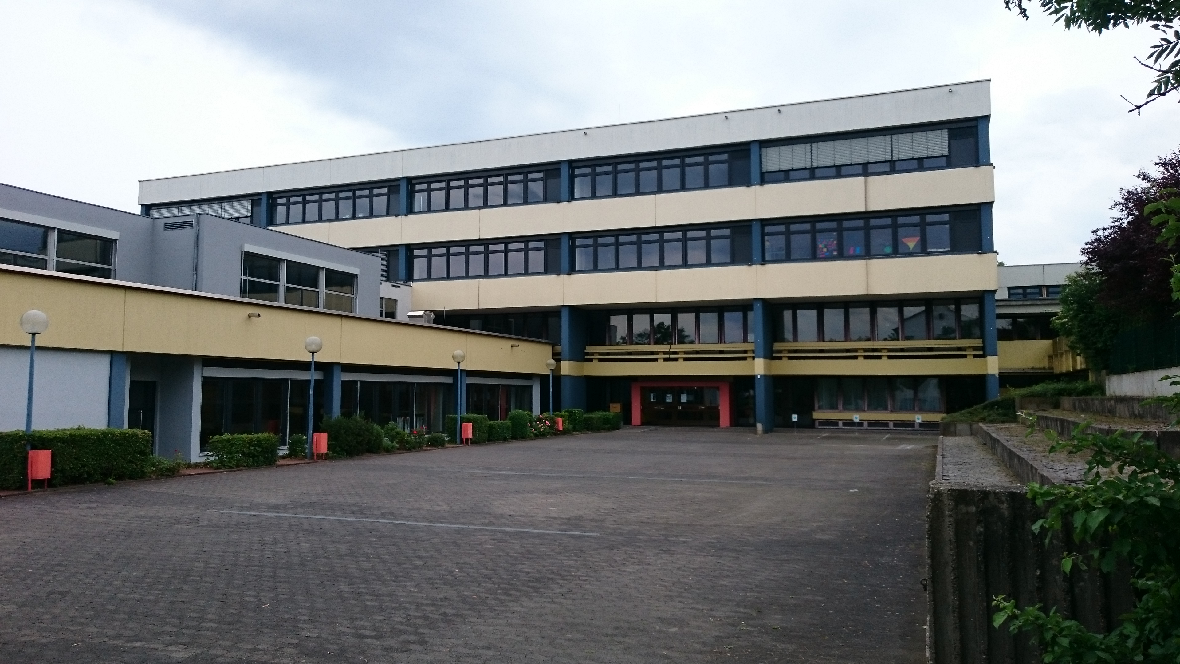 Haupteingang der Wigbertschule Hünfeld im Juni 2016